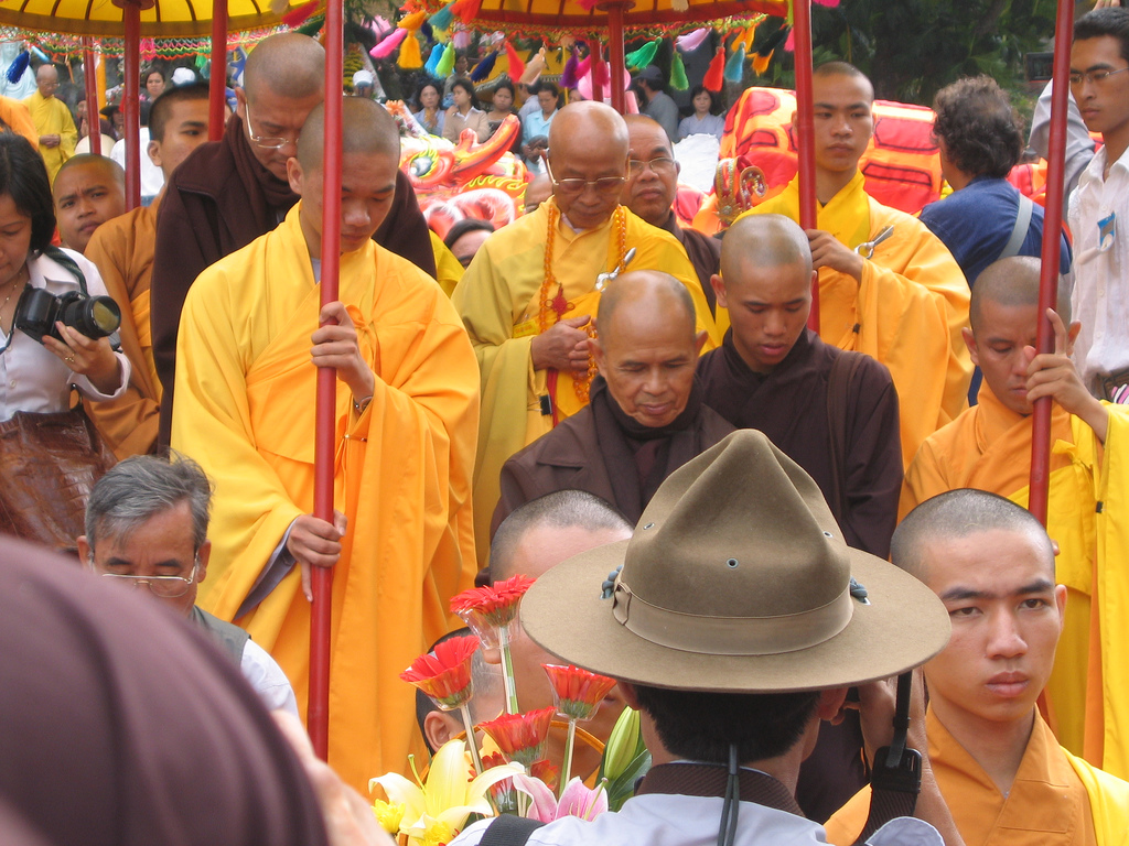 Thich Nhat Hanh in Vietnam during his 2007 trip